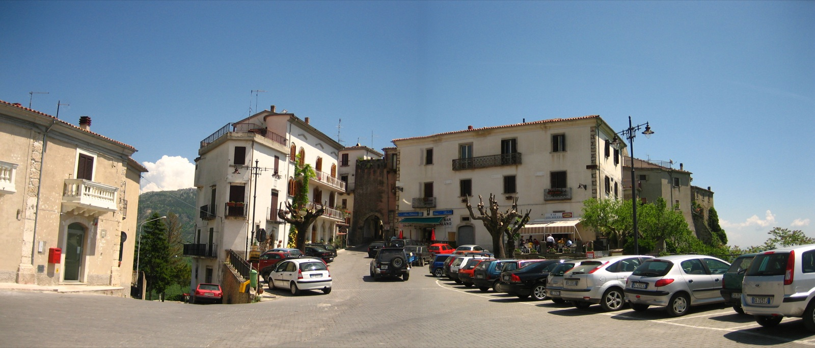 Castel San Vincenzo, Molise, Italy